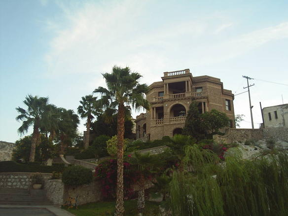 Casa del Cerro en Torreón, México.